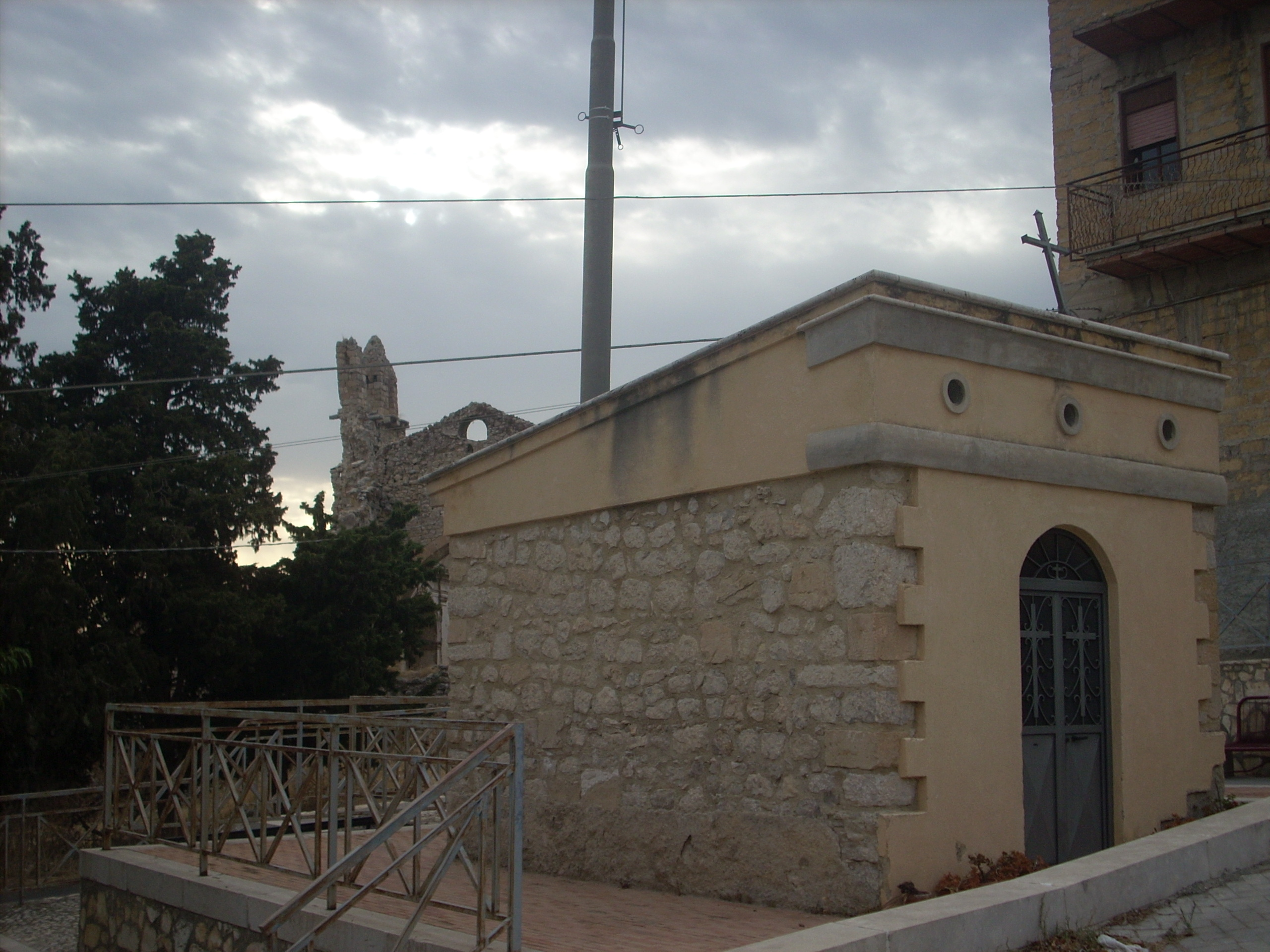 Cappella della Madonna della Sprescia